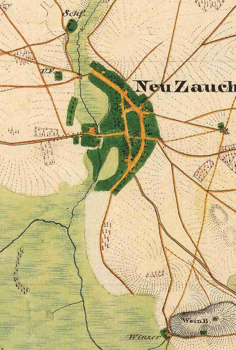 Neu Zauche, Ortsteil der Gemeinde Neu Zauche, Landkreis Dahme-Spreewald, Brandenburg, Deutschland, Ausschnitt aus dem Urmesstischblatt 4050 Straupitz von 1846